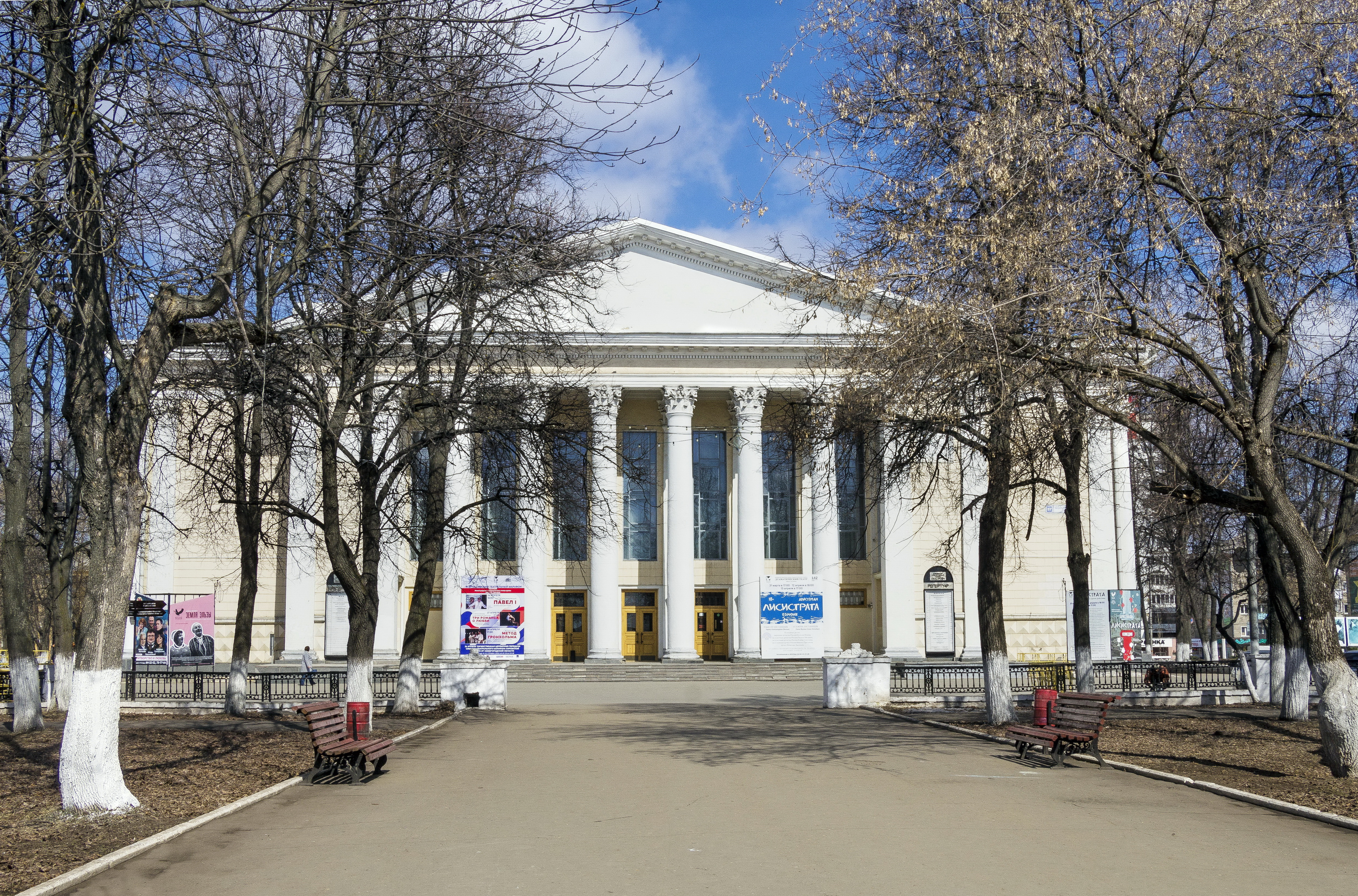 Здание театра: улица Московская, 37, Киров, Кировская область